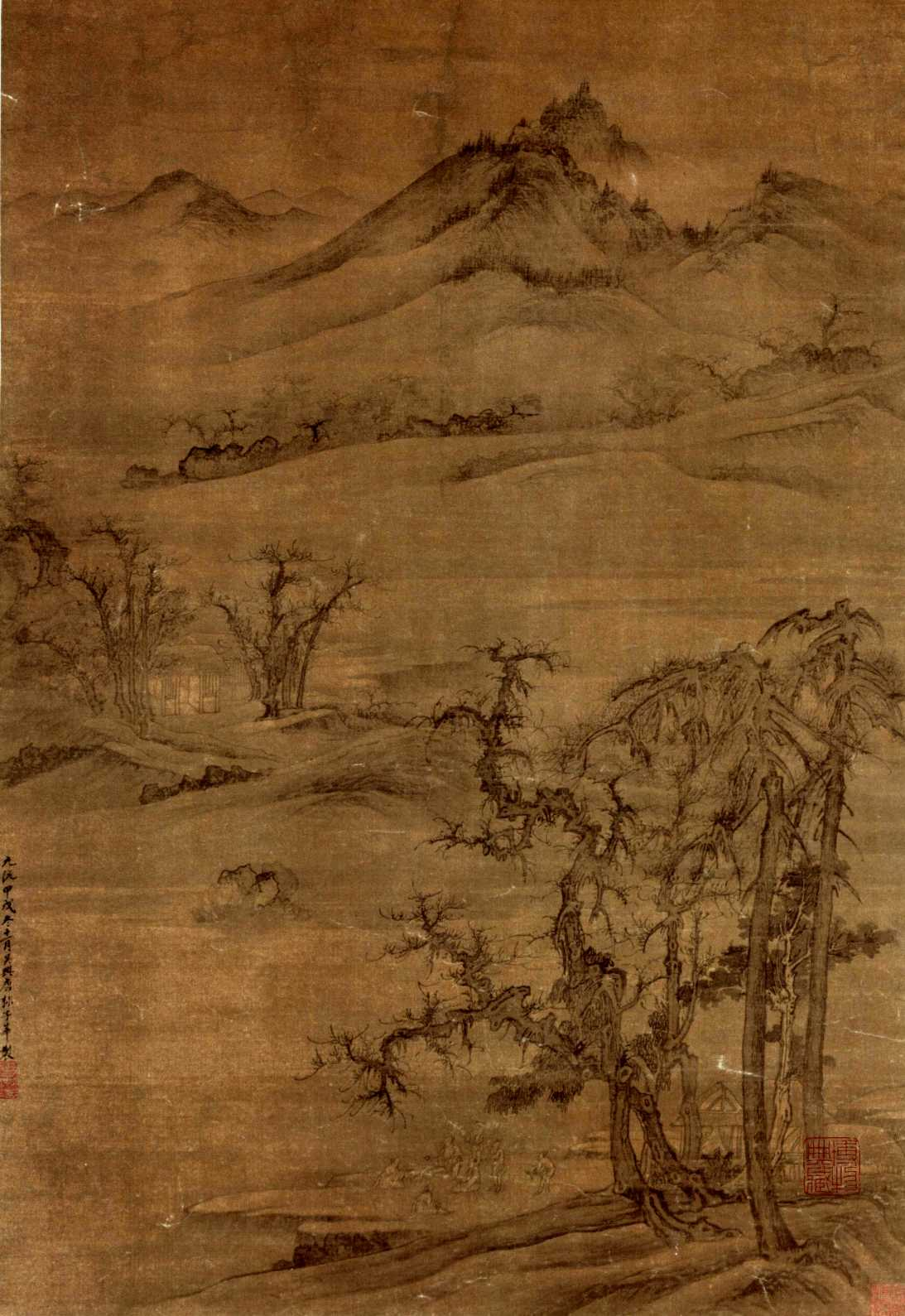 Beuverie à l'ombre des pins par le peintre chinois Tang Di (1296-1364). Rouleau mural, encre et couleurs sur soie daté 1334. Ses dimensions en centimètres sont: 141,1x97,1. Cette œuvre est conservée au Musée de Shanghai.